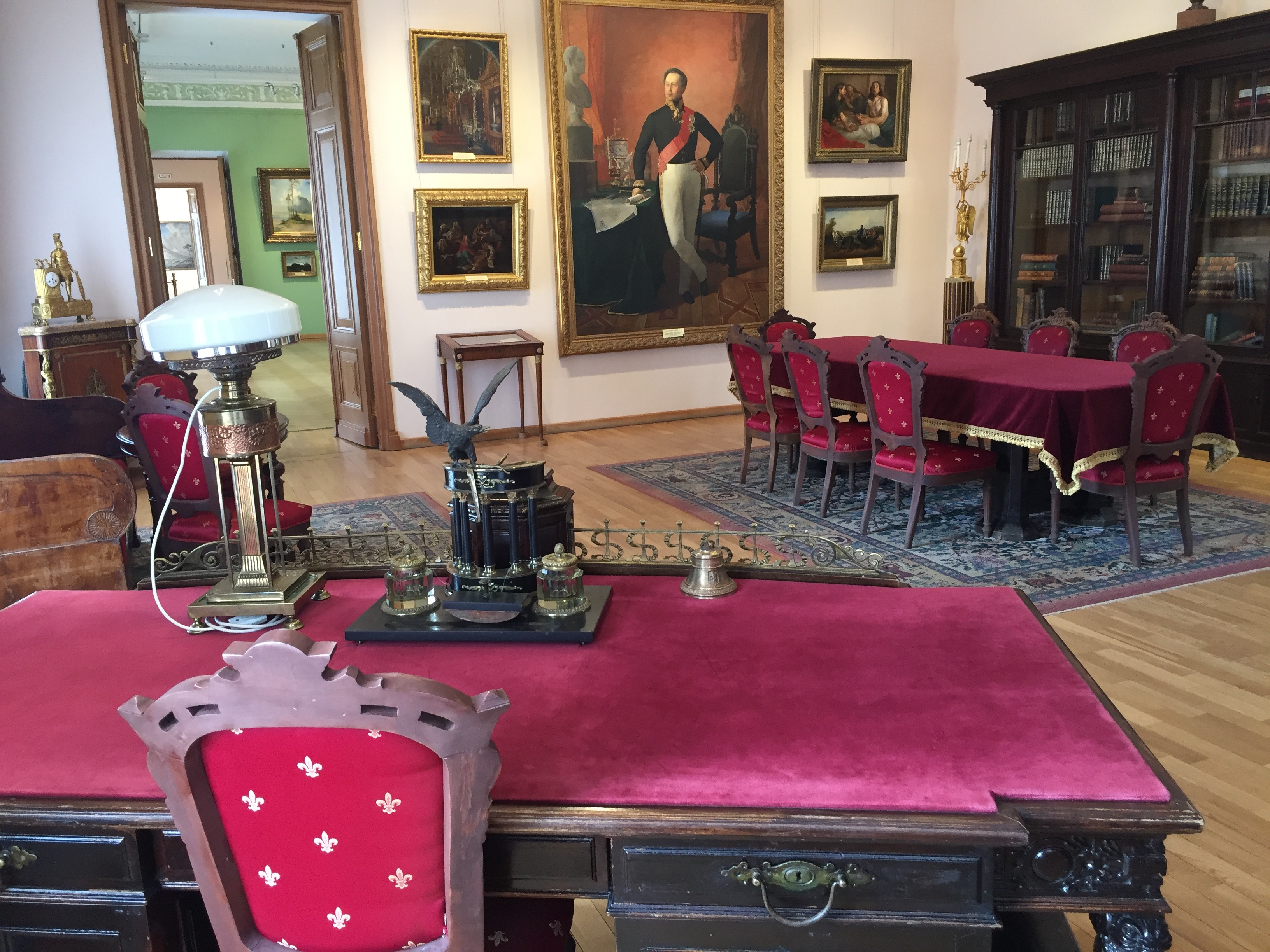 Кабинет в Губернаторском доме